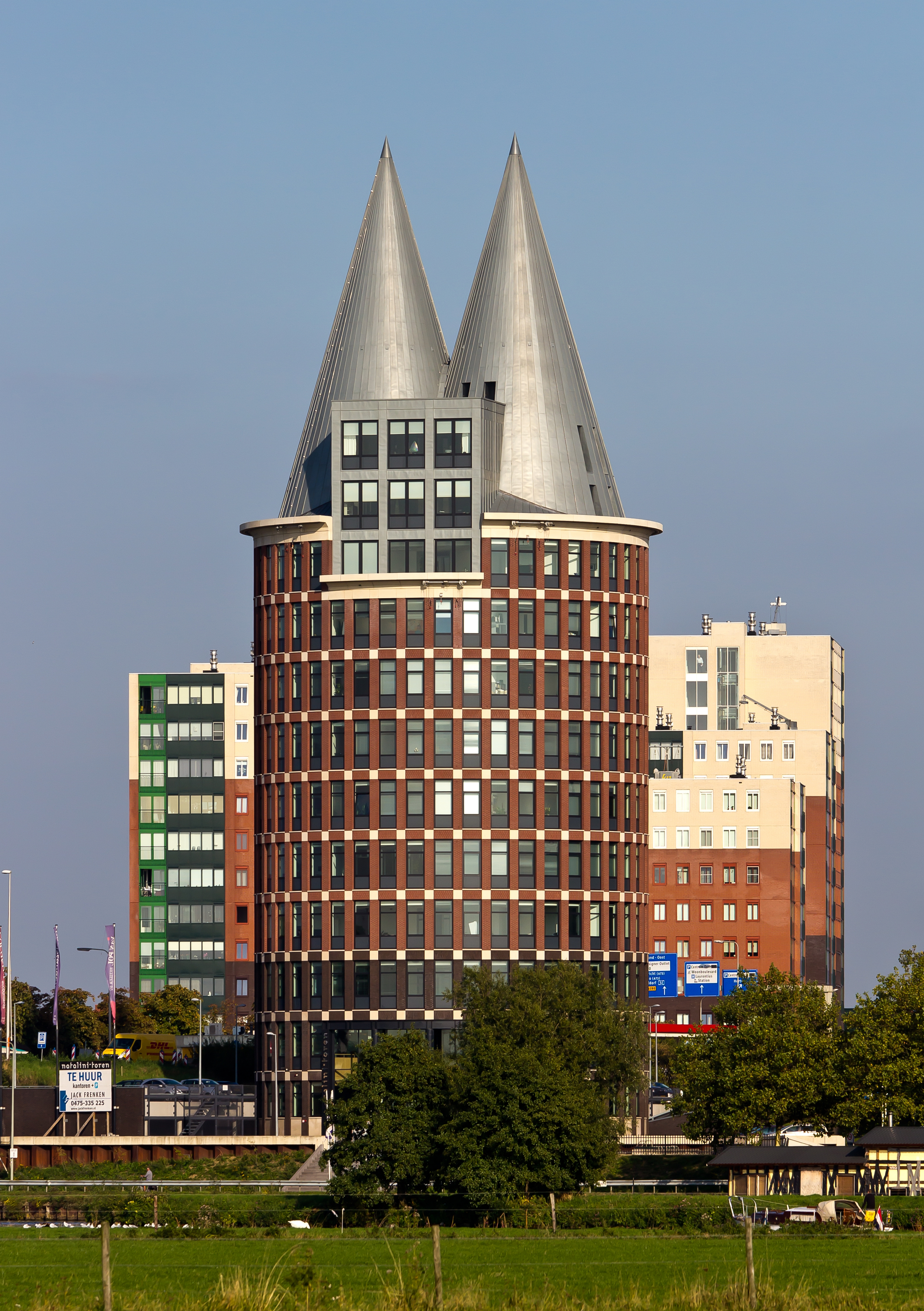 Natalini Toren Roermond